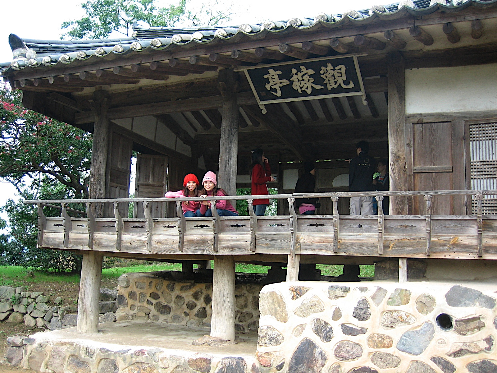 Gwangajeong Pavilion at Yangdong Folk Village in Gyeongju, Gyeongsangbuk-do, South Korea